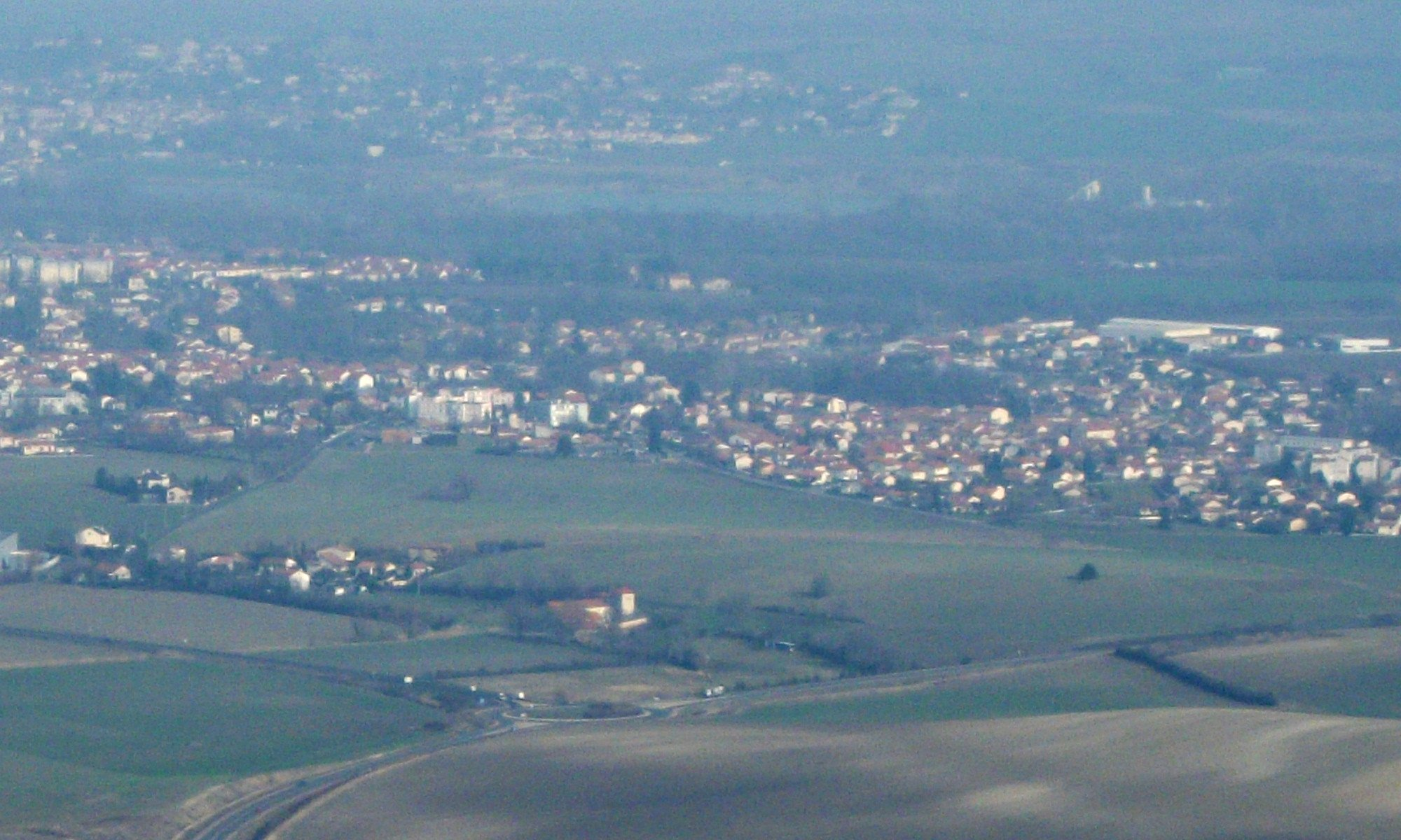 Le Cendre depuis le plateau de Gergovie, Puy-de-Dôme, France.